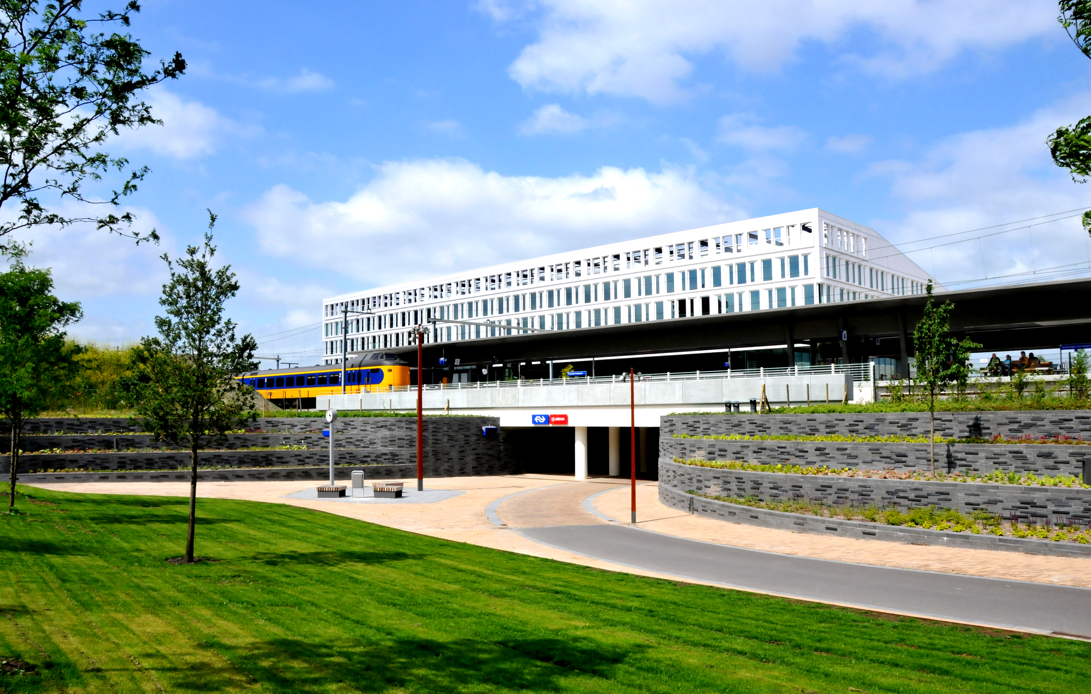 Station Groningen Europapark